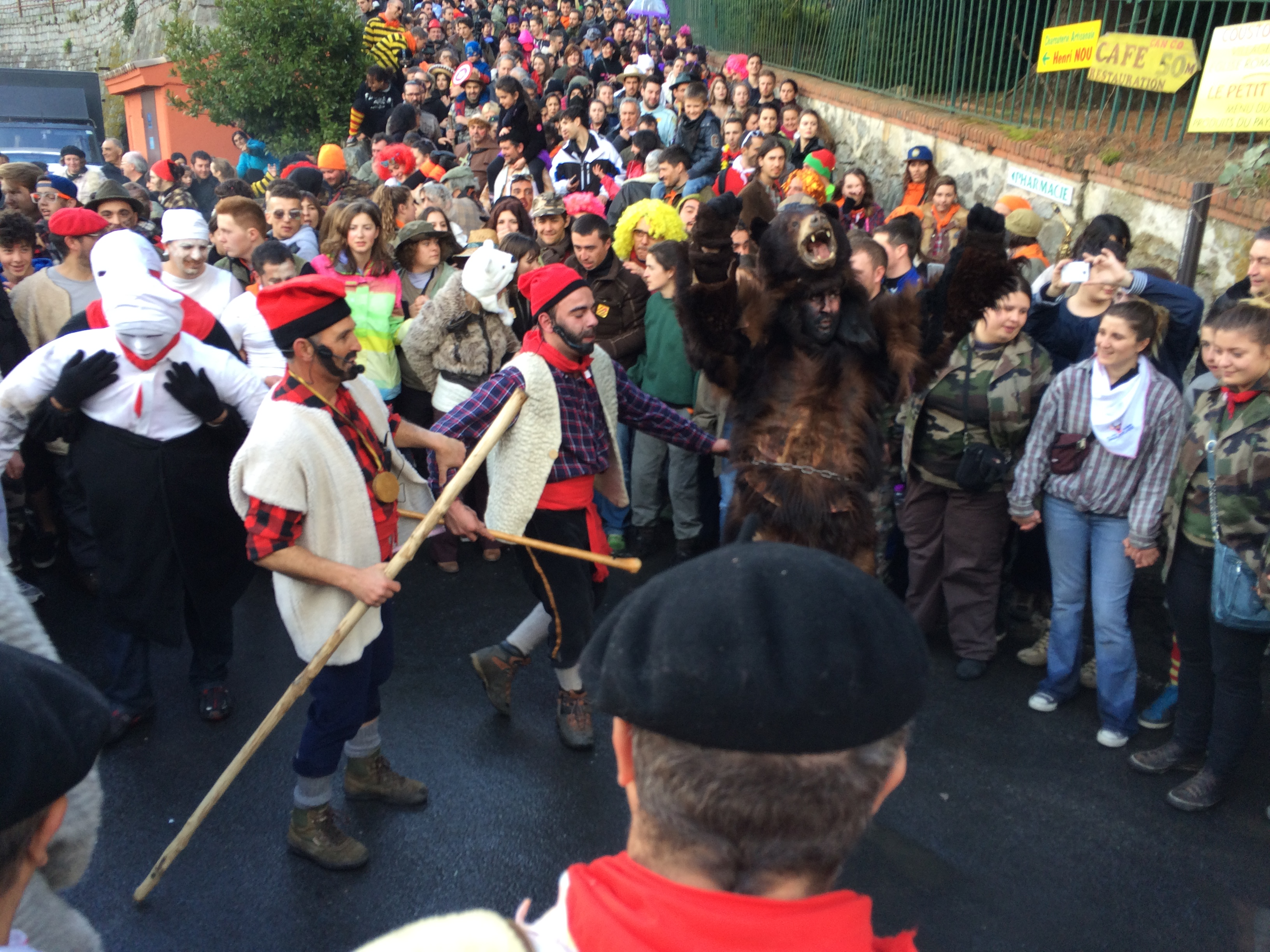 La Fête de l'Ours de Saint-Laurent-de-Cerdans, avec le Menaire, la Monaca et l'ours Martí